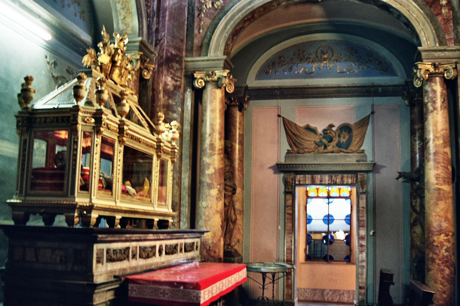 Fara Novarese (NO), Oratorio Scurolo di San Damiano: interno.